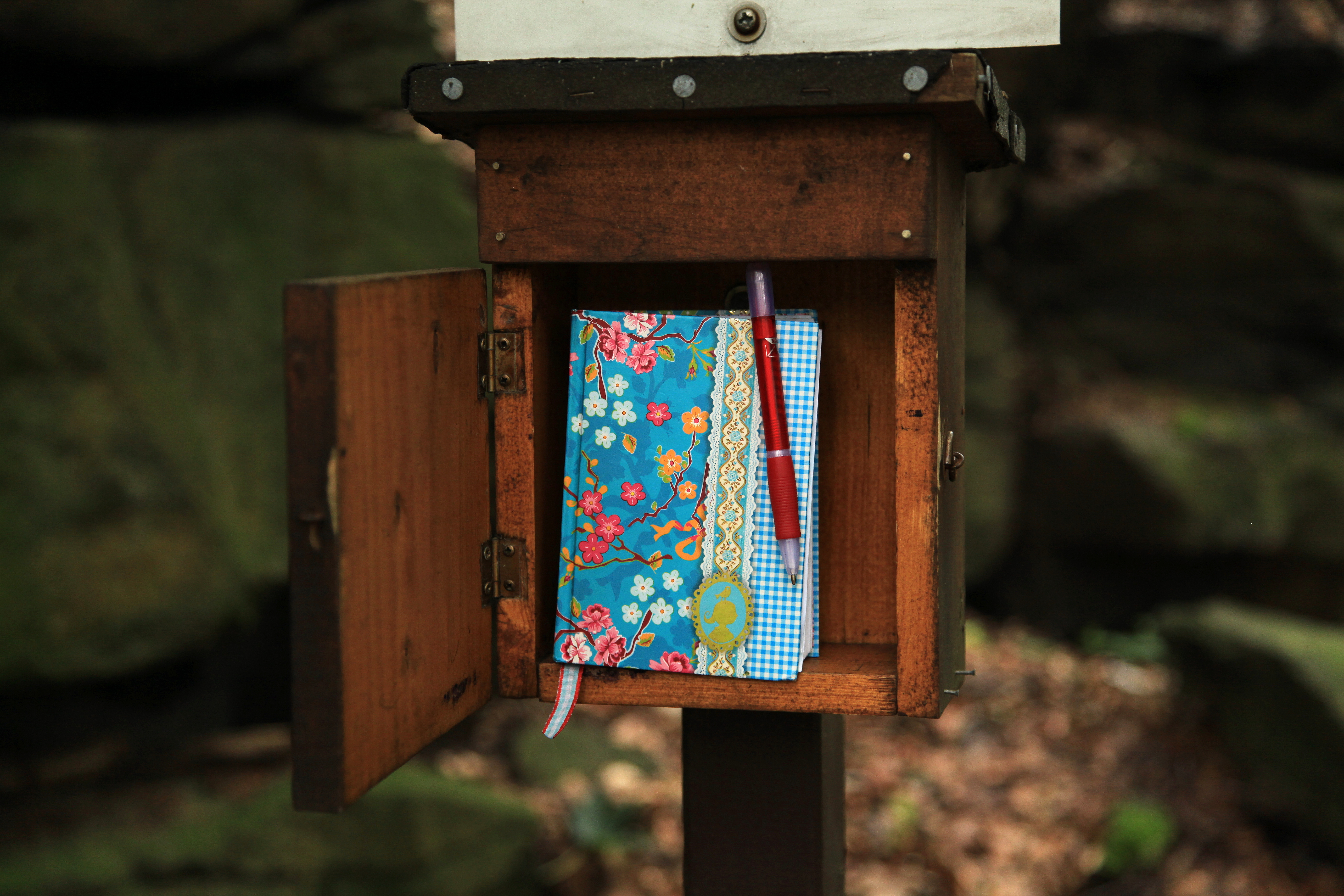 Teufelsfensterbuch auf dem Czorneboh in Hochkirch